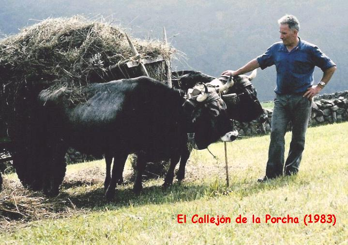 Cliché personnel :attelage de vaches de la race Tudanca. Travail des champs en aout 1983. Valle de SAJA (Cantabrie).